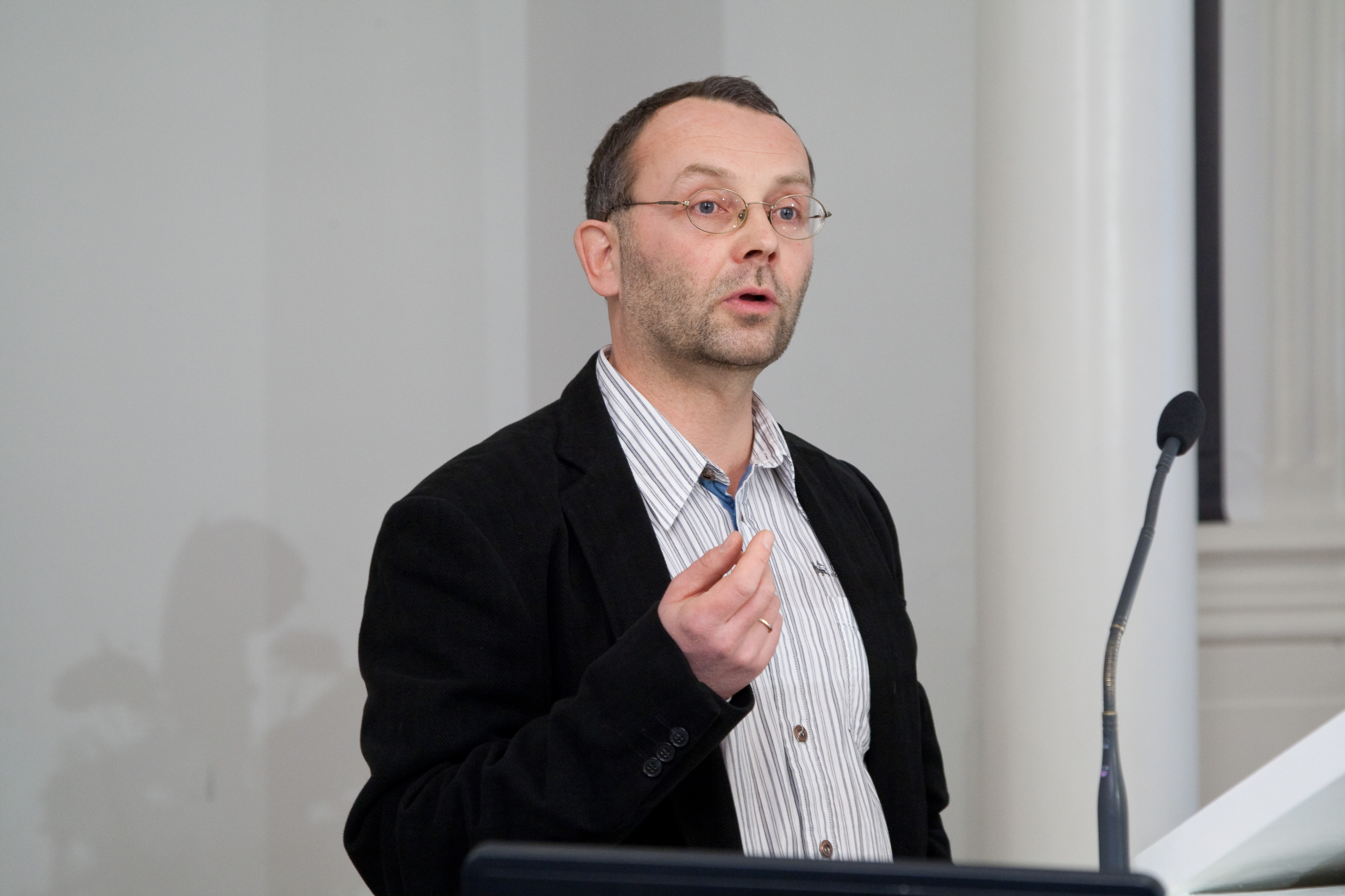 Darwini 200. sünniaastapäevale pühendatud konverents "Elurikkus ja evolutsioon" Tartu Ülikooli aulas 12. veebruaril 2009. Paneeldiskussioon "Bioevolutsiooni ja elurikkuse võtmeküsimusi 21. sajandil". Esineb TÜ professor Peeter Hõrak.